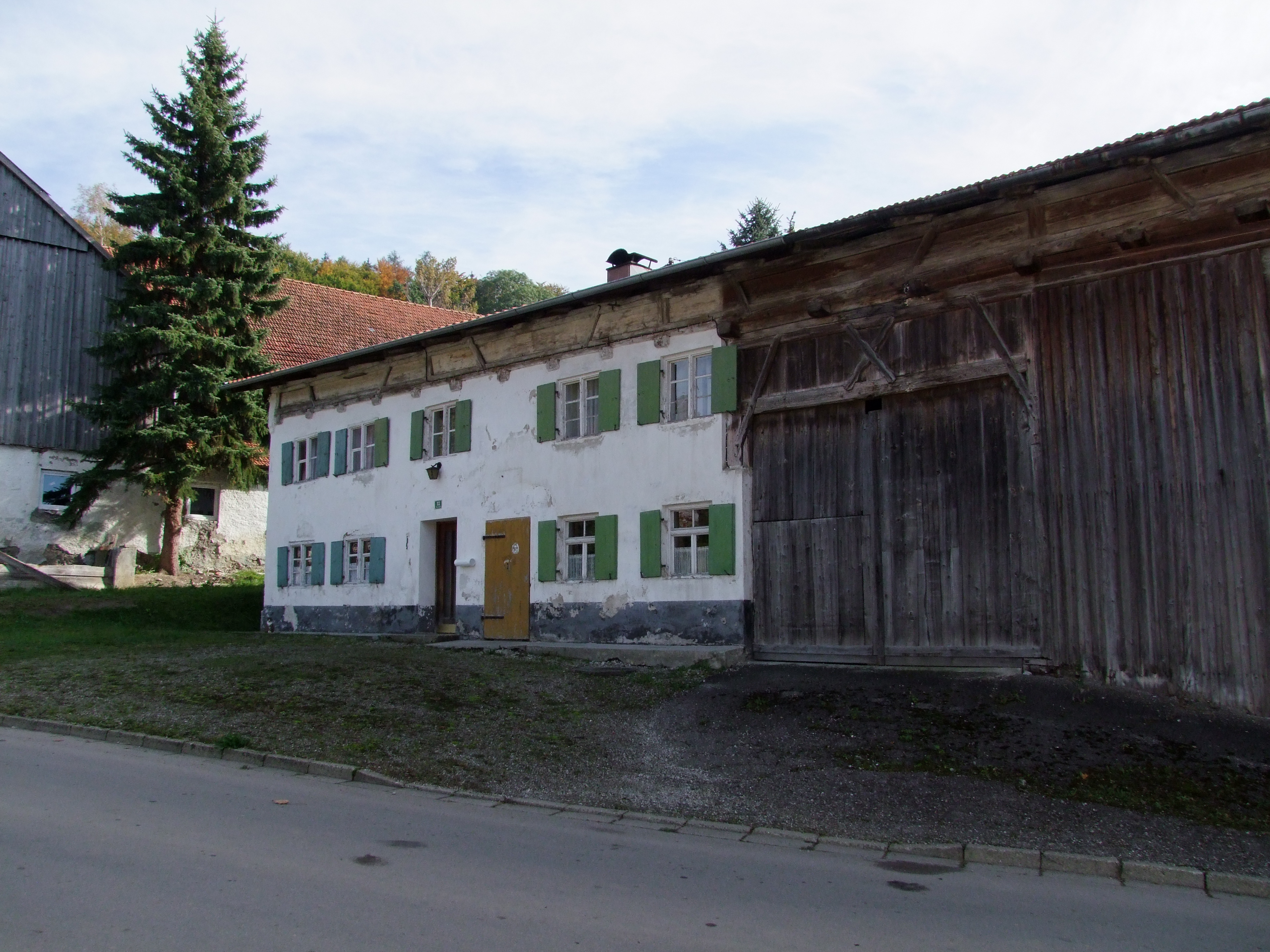 St. Franziskus und Georg im oberschwäbischen Altensteig, einem Ortsteil von Dirlewang in Bayerisch/Schwaben